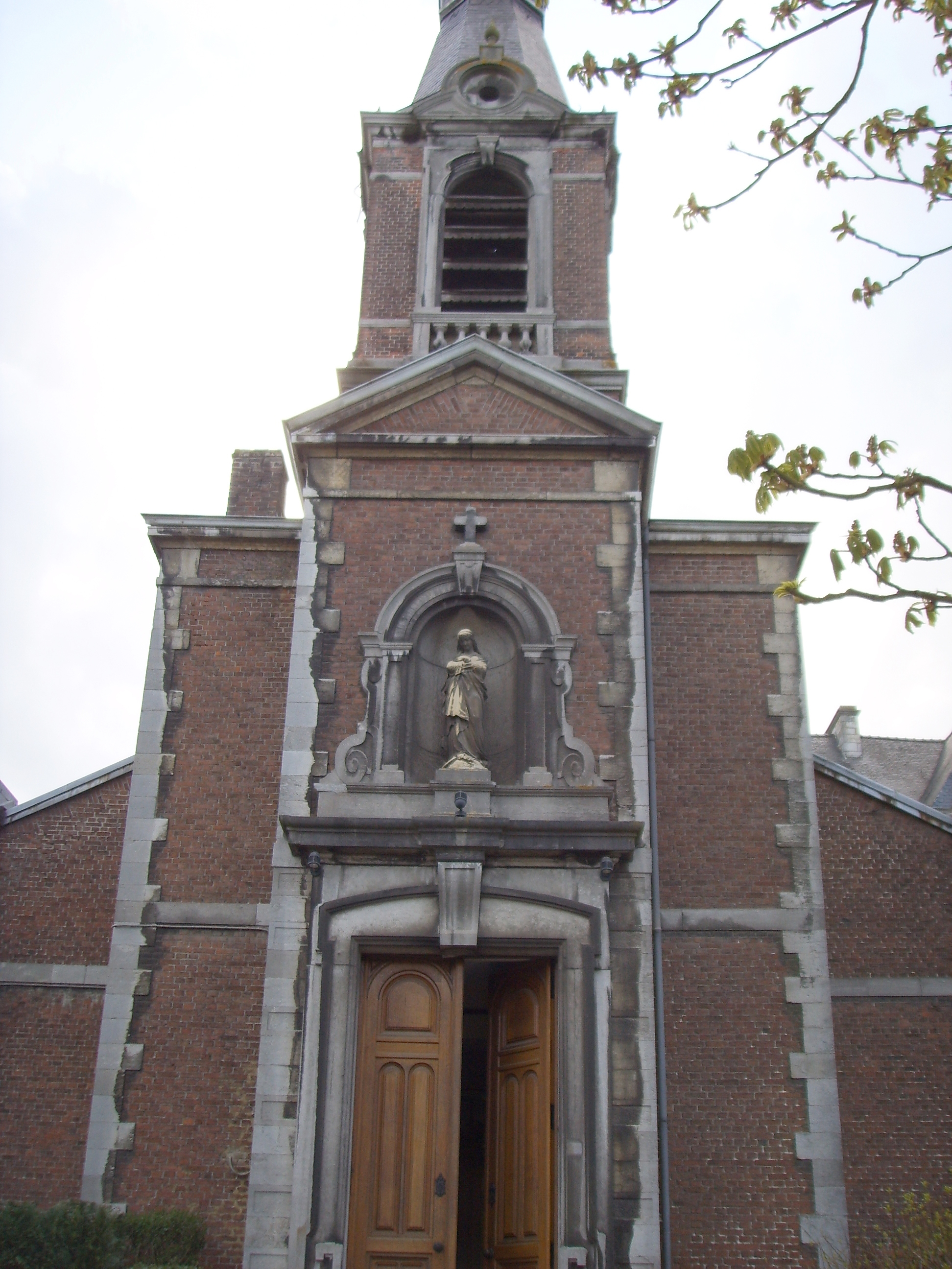 Walon: Eglîjhe di Presles